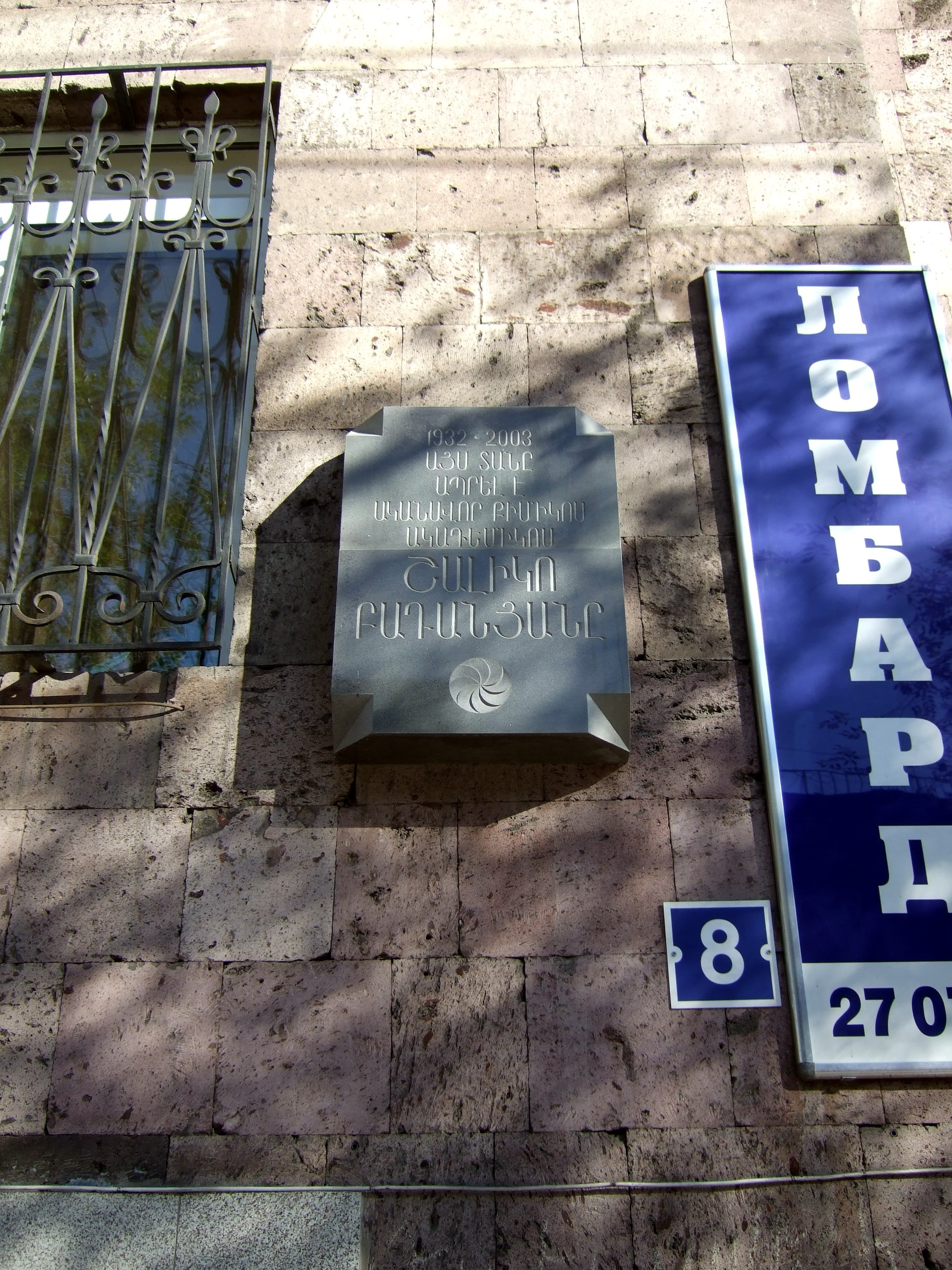 Այս տանը ապրել է ականավոր քիմիկոս ակադեմիկոս Շալիկո Բադանյանը (1932-2003)